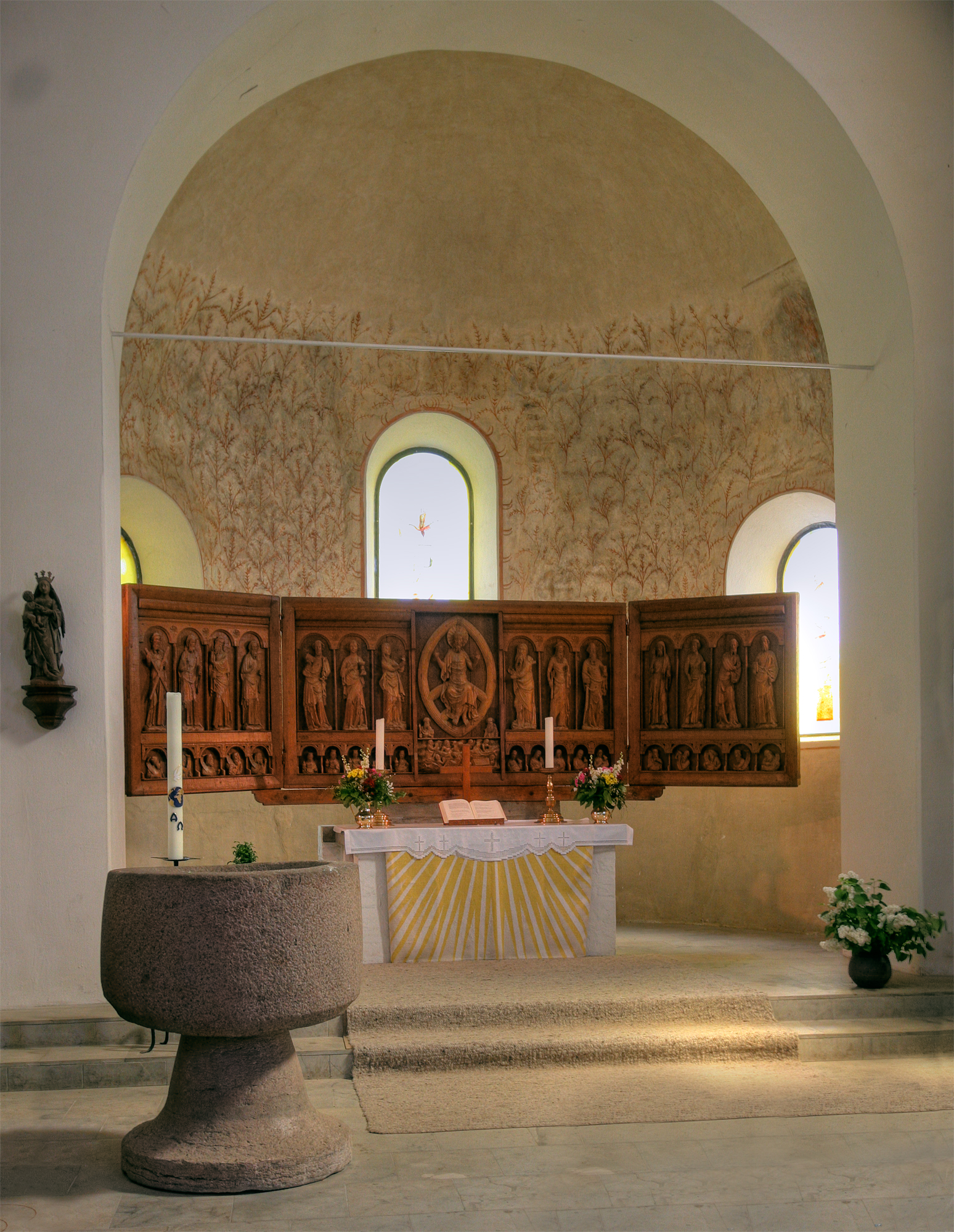 Petrikirche in Bosau, Eichen-Schnitzaltar und Taufbecken